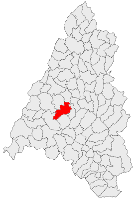 Categorie:Hărţi ale judeţului Bihor